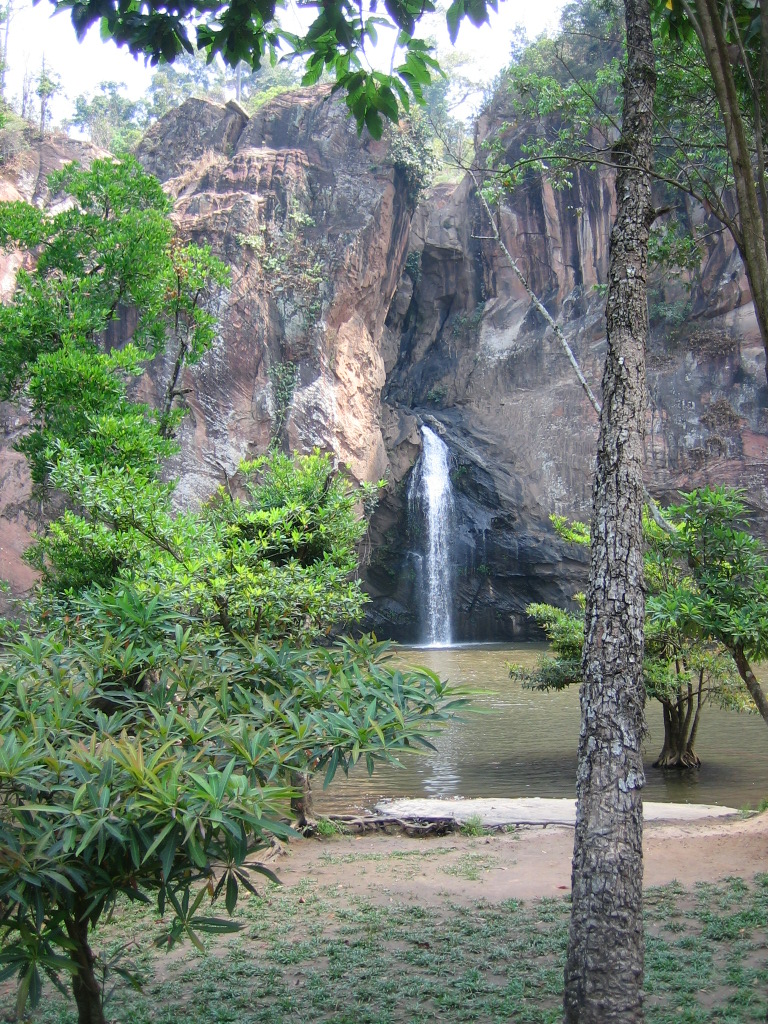 Chattrakan Waterfall, Foto von Martin Püschel, 26.02.2006